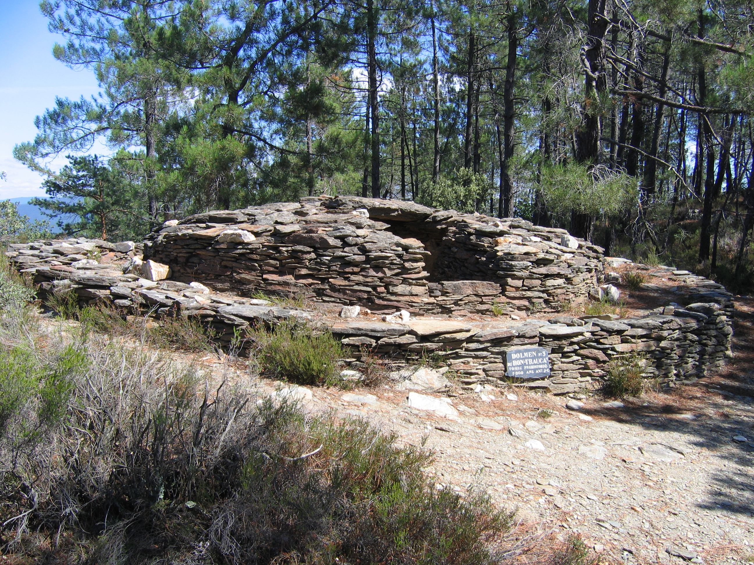 Description: Dolmen du Ronc Traoucat, Cévennes schisteusesGard, France Source: Hugo Soria Licence: GFDL Hugo Soria